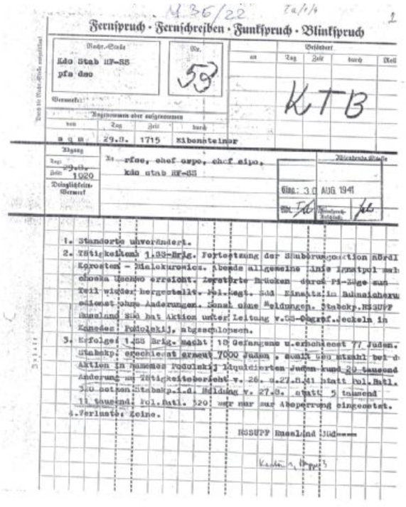 Fernschreiben des HSSPF Russland Süd, Jeckeln, vom 29. August 1941: „[…] Tätigkeiten […] Stabskp. HSSPF Russland Süd hat Aktion unter Leitung v. SS-Obergruf. Jeckeln in Kamenenz Podolskij, abgeschlossen. […] Erfolge: […] Stabskp. erschießt erneut 7000 Juden, somit Gesamtzahl bei der Aktion in Kamenez Podolskij liquidierten Juden rund 20 tausend. Änderung zu Tätigkeitsbericht v. 26. und 27.8.41 statt Pol.Batl. 320 setzen Stabskp. i.d. Meldung v. 27.8. statt 5 tausend 11 tausend. Pol.Batl. 320 war nur zur Absperrung eingesetzt. […]“